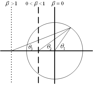 中文（台灣）: 極座標表示